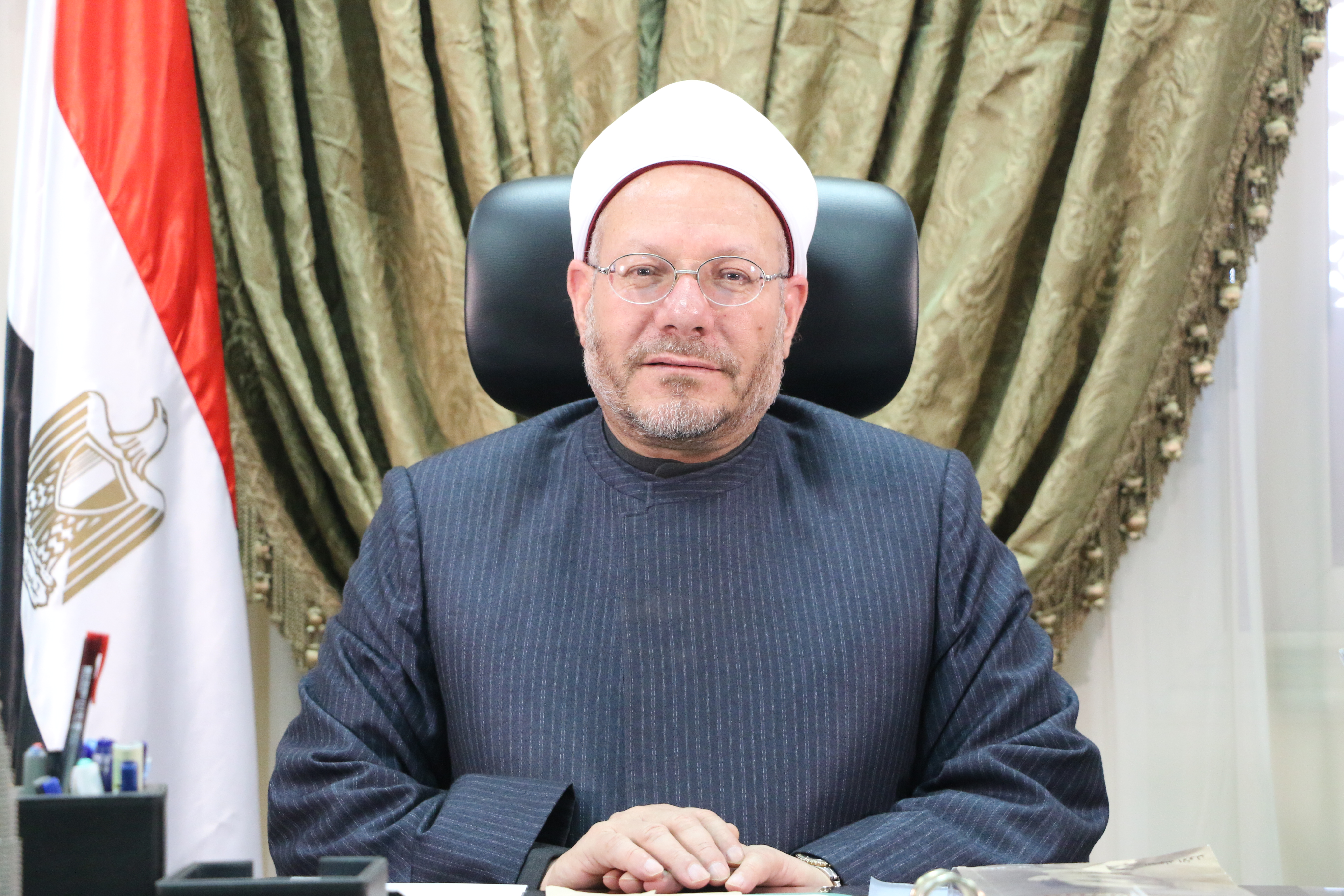 أ.د شوقي علام مفتي الجمهورية